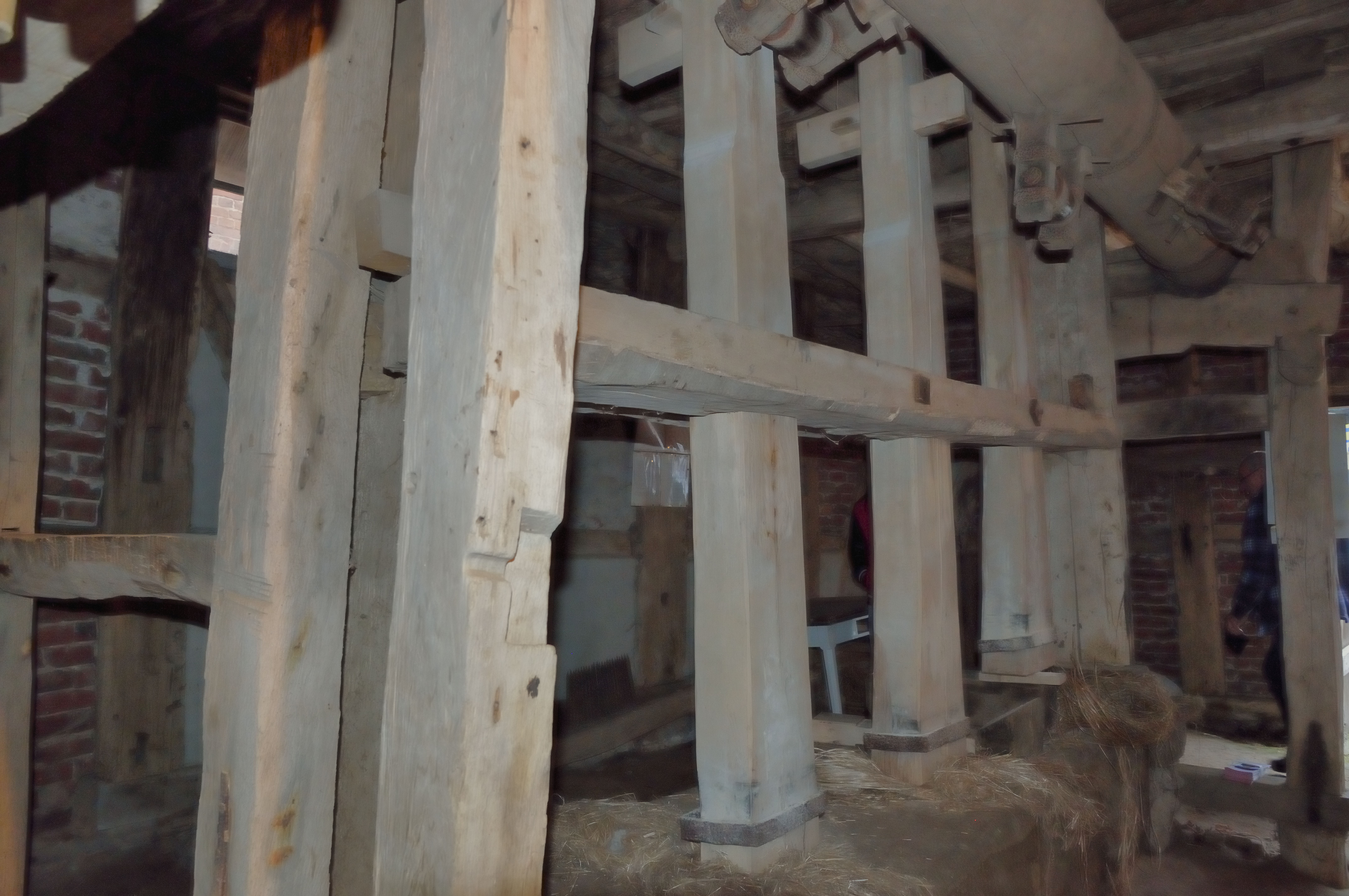 Rossmühle Oberbauerschaft in Duitsland, stampers beukmolen